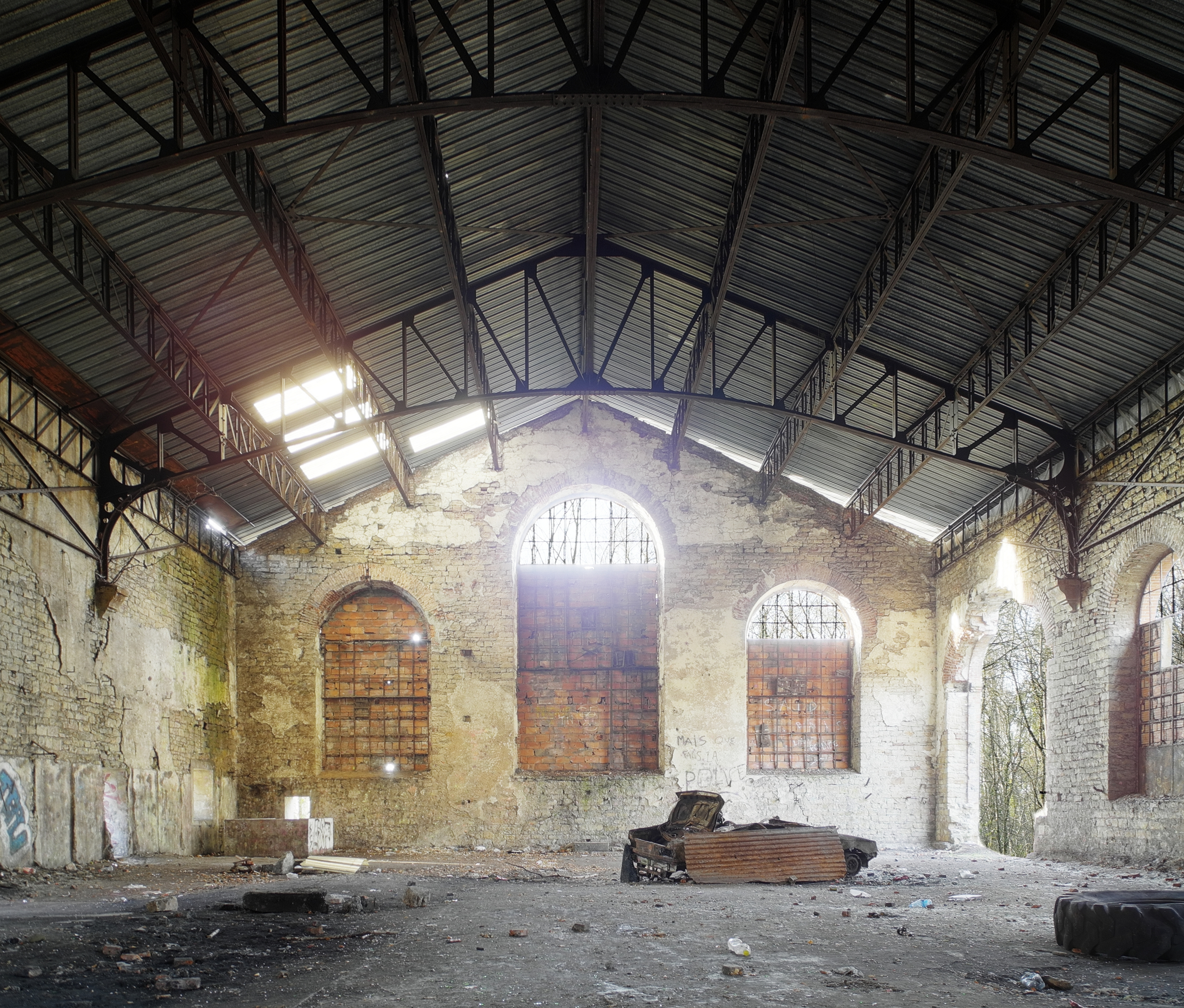 Puits Arthur de Buyer : salle des pendus (HDR).